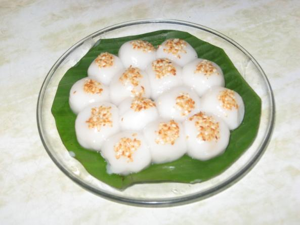 Hình thu nhỏ của một đĩa bánh trôi, làm minh hoạ cho bài viết về đối tượng